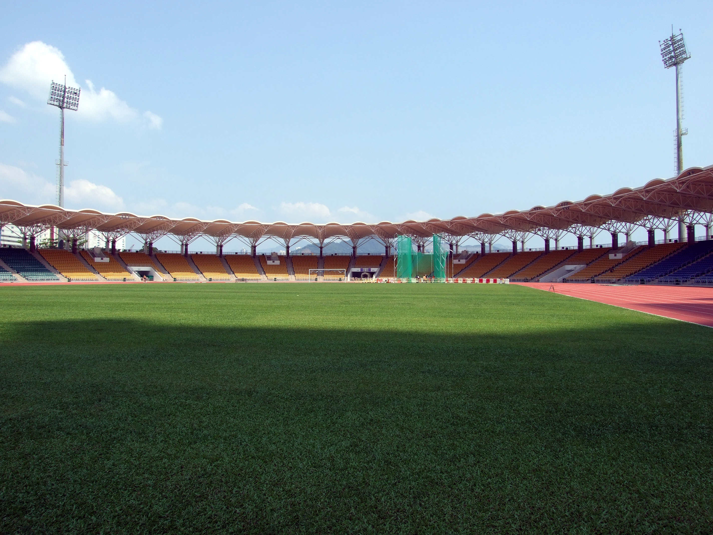 中文（香港）: 小西灣運動場